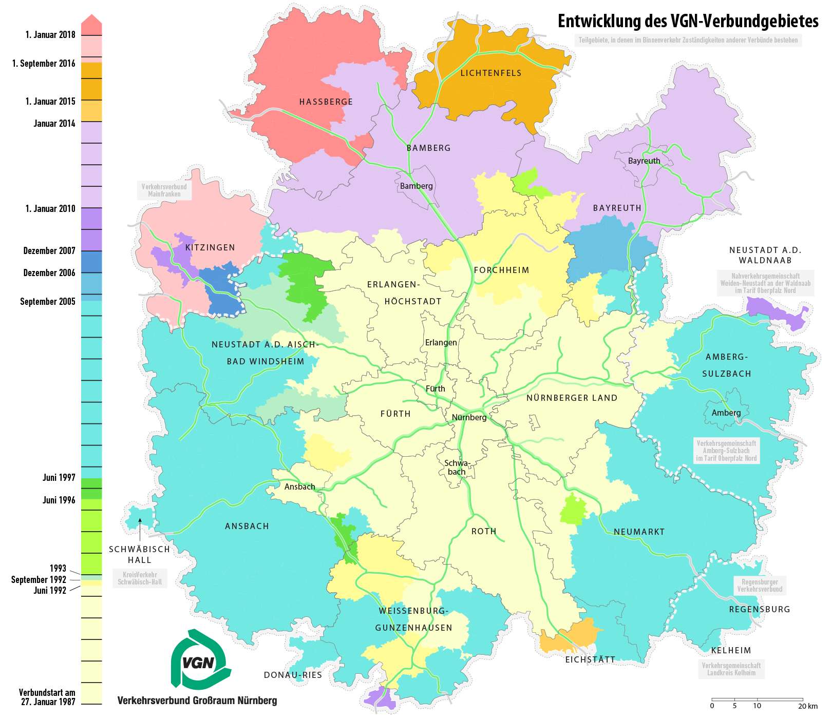 Karte Entwicklung des VGN-Verbundgebietes